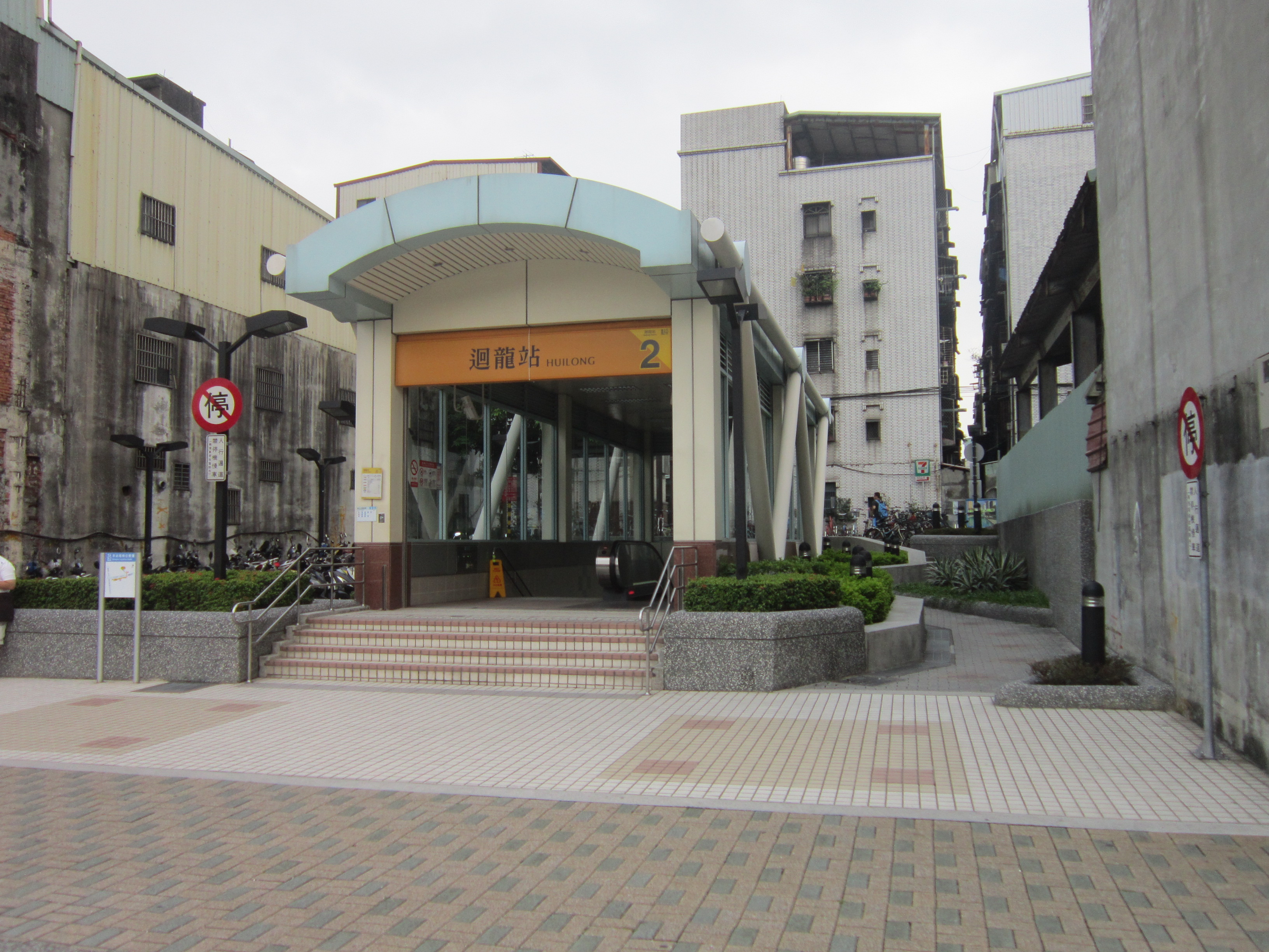 台北捷運新爐中和線迴龍站2號出口